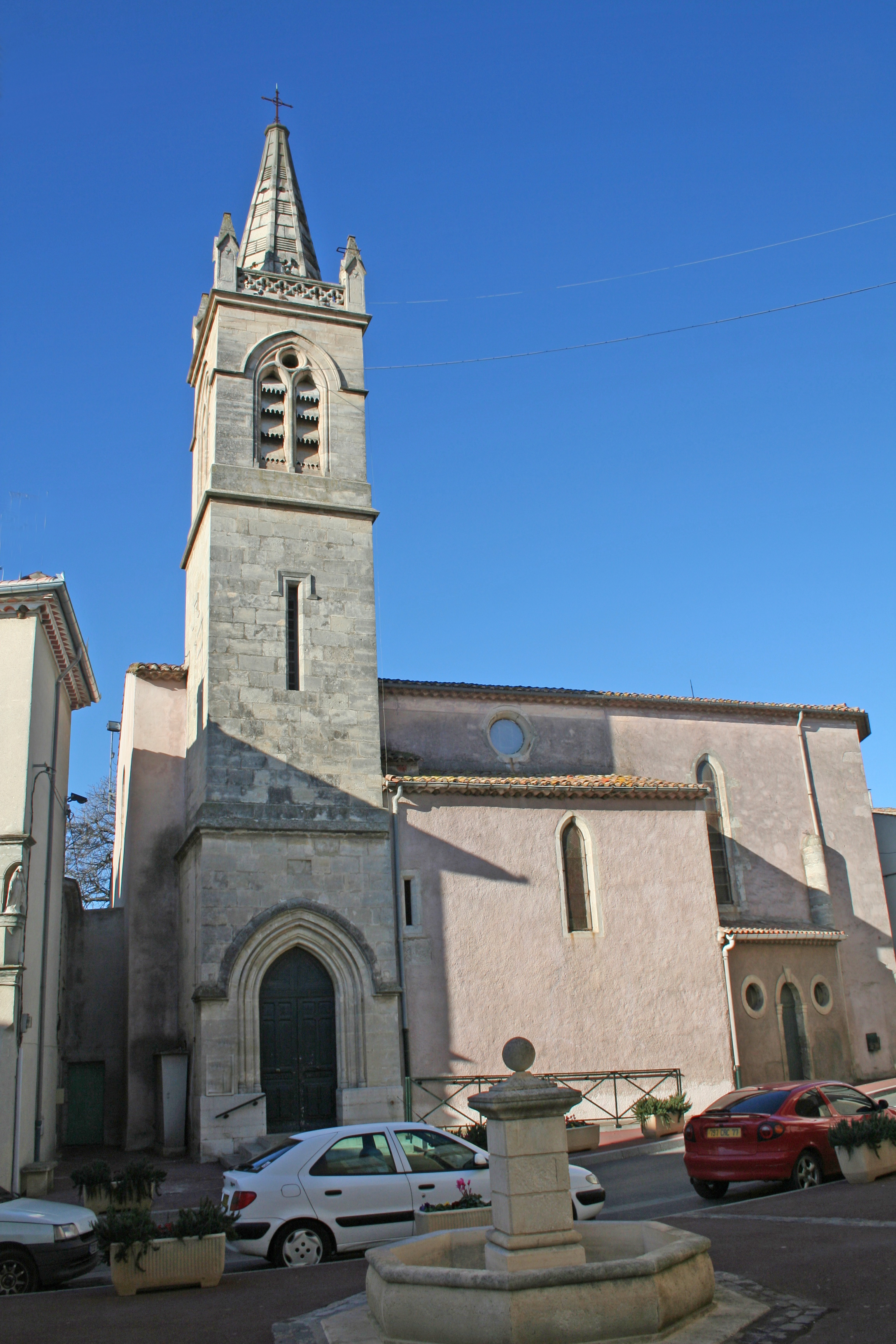 Cers (Hérault) - Église Saint-Genies.